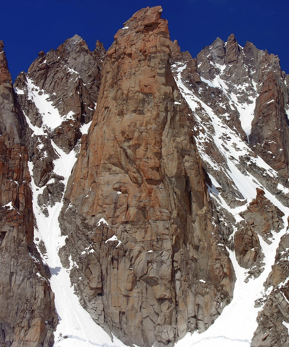 06255 Monti il Grand Capucin Courmayeur 13-06-2006.jpg - Alpi Graie - Francia